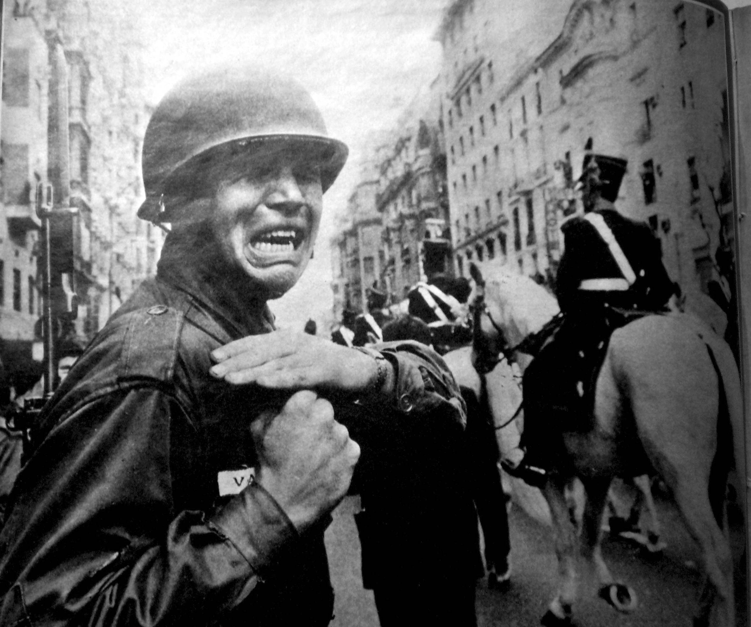 Soldado cubriendo guardia de honor durante el sepelio de J.D. Perón